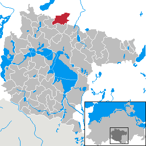 Schwinkendorf im Landkreis Müritz, Mecklenburg-Vorpommern